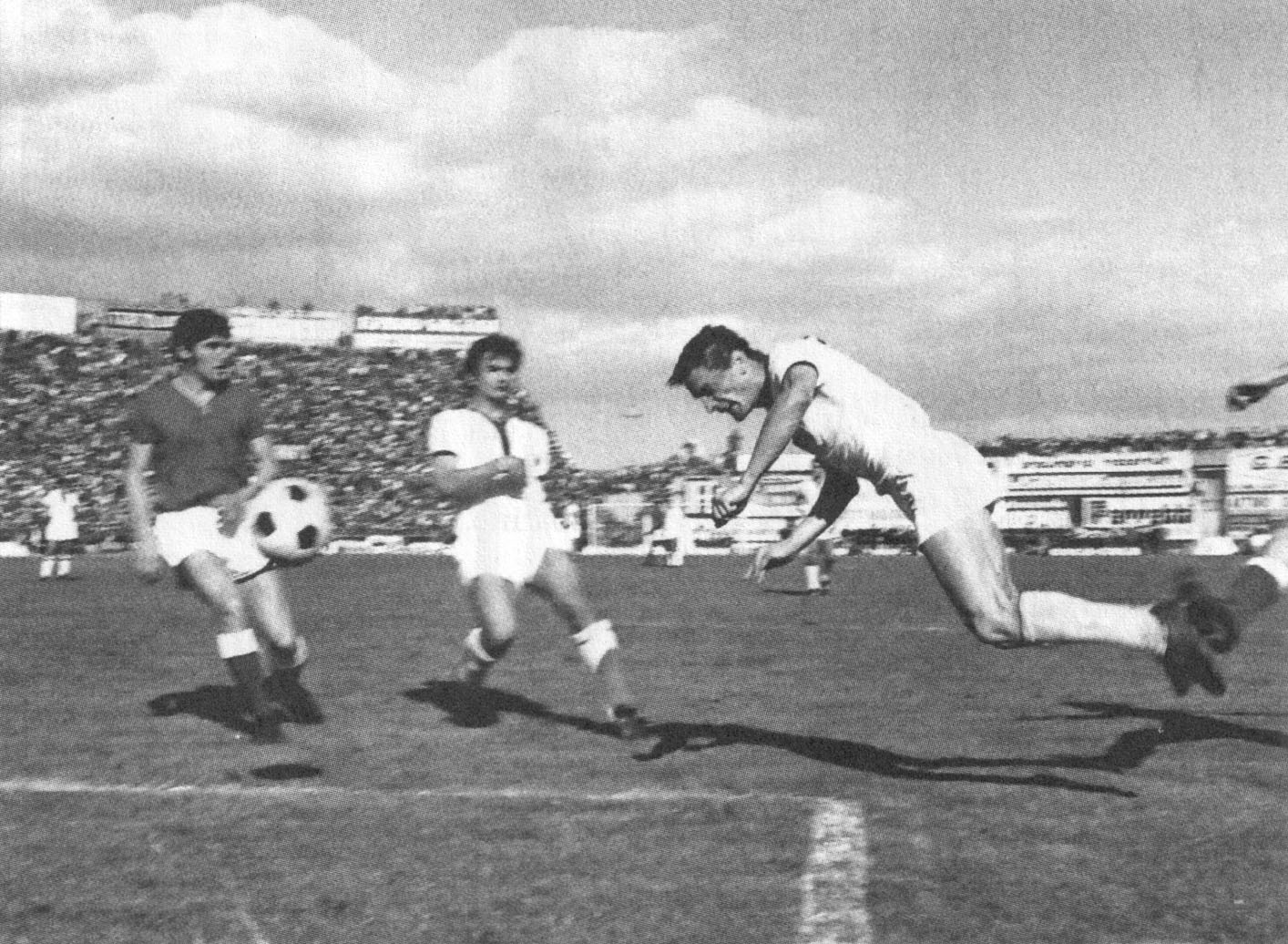 Cagliari (Italia), stadio Amsicora, 12 aprile 1970. L'attaccante rossoblù Luigi "Gigi" Riva (a destra), sotto lo sguardo del compagno di squadra Sergio "Bobo" Gori (al centro), trova il gol del raddoppio nel corso della sfida tra Cagliari e Bari (2-0) valevole per la 28ª giornata del campionato italiano di Serie A 1969-70; il successo diede matematicamente al Cagliari la certezza dello scudetto, il primo per i sardi nonché per una squadra del Mezzogiorno nella storia della massima serie calcistica italiana.